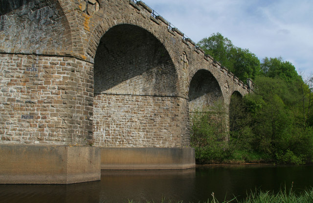 Kielder Viaduct